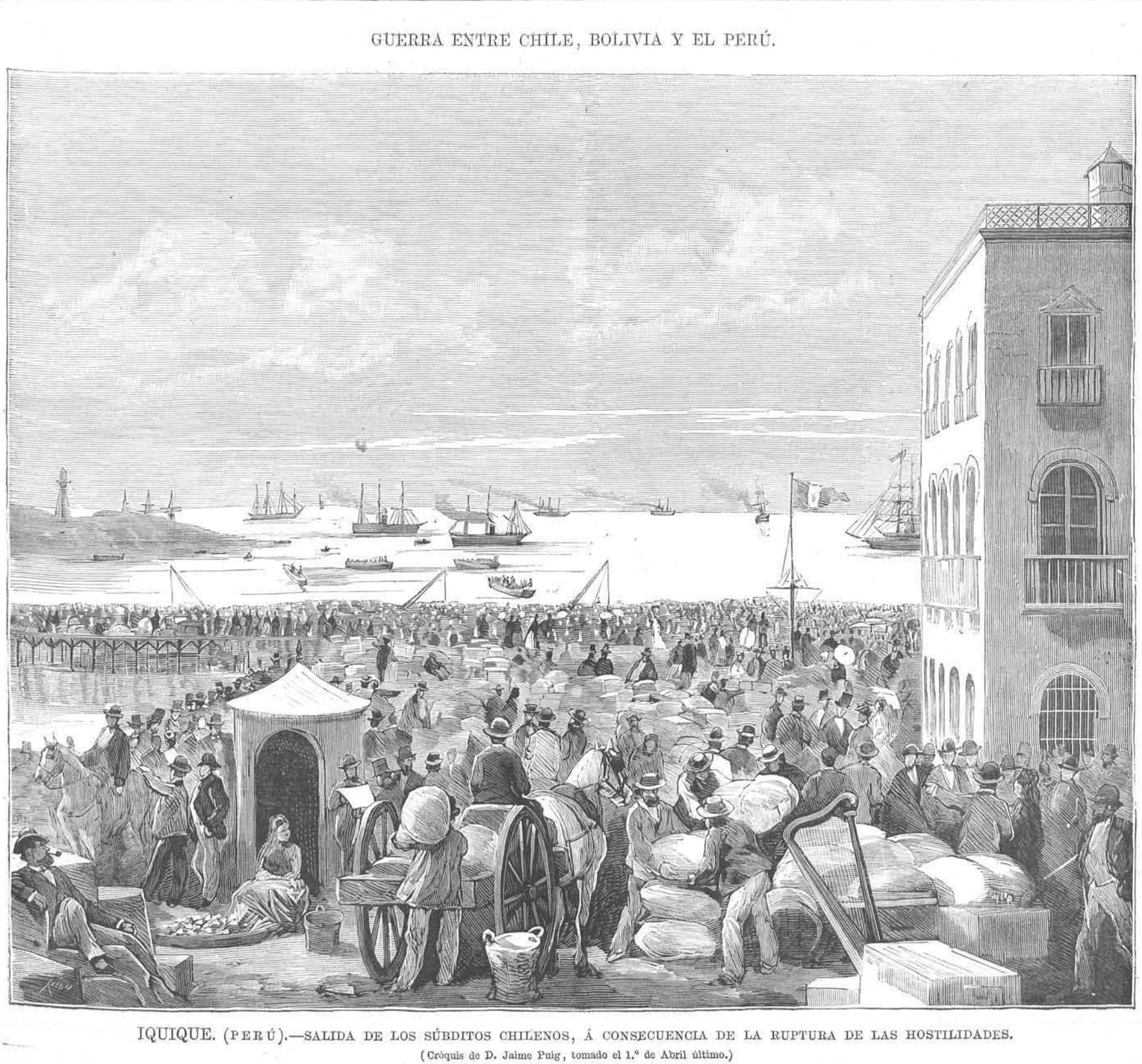 Salida de chilenos de Iquique tras la ruptura de hostilidades